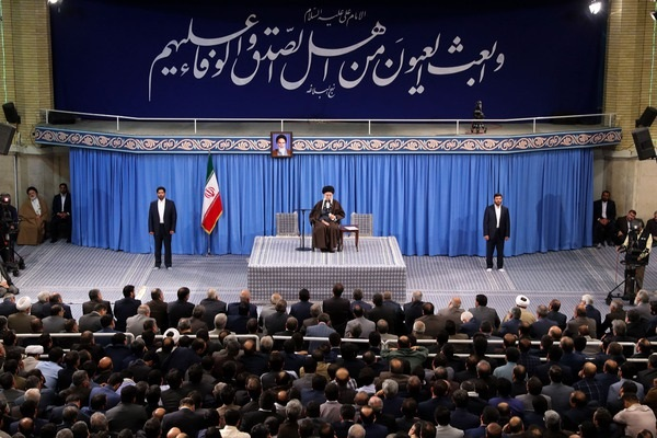 دیدار کارکنان و مدیران وزارت اطلاعات فروردین 1397